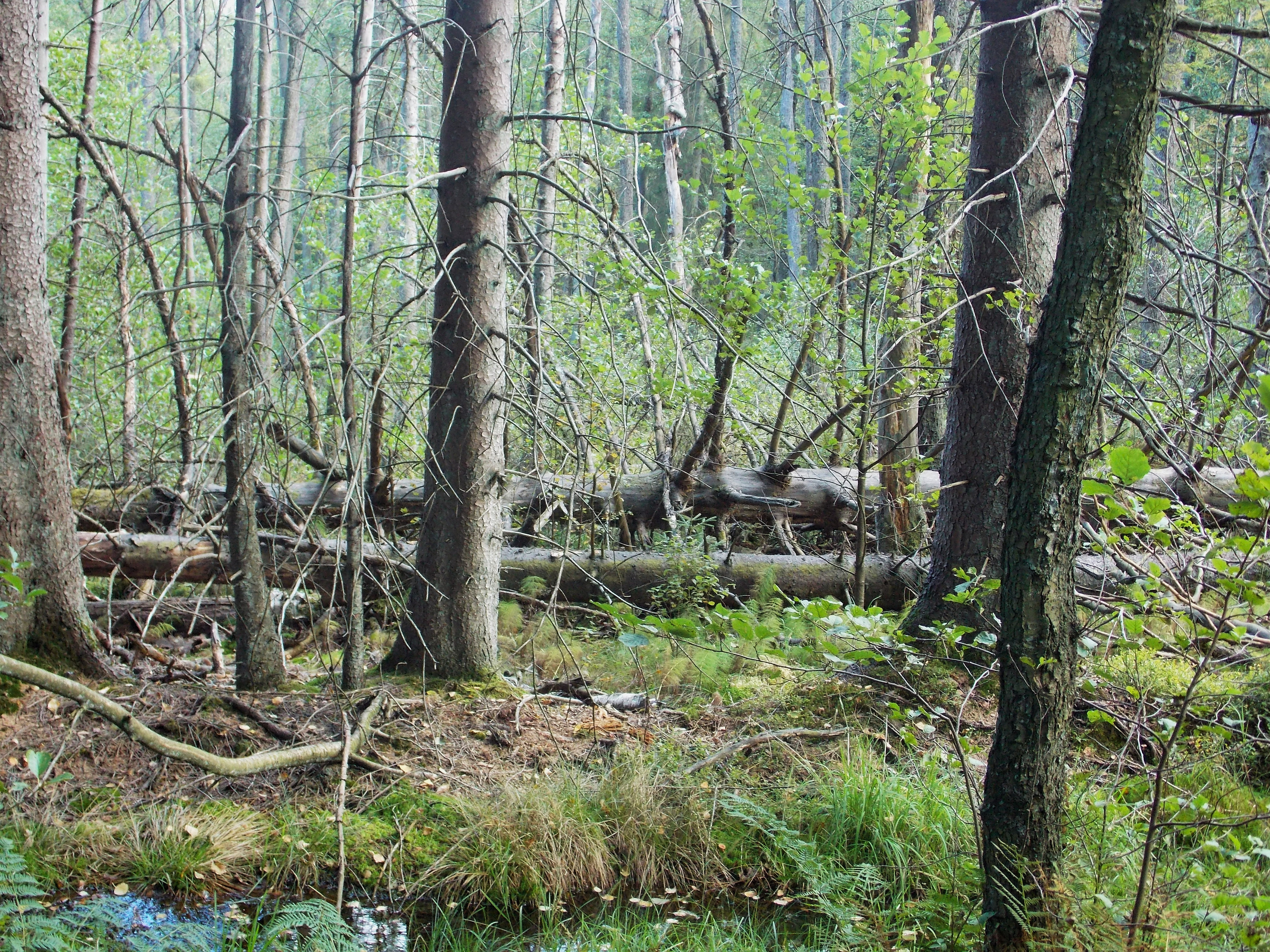 NSG Buchen- und Bruchwälder bei Einsiedelei und Apollmicke (Kreis Olpe, NRW)